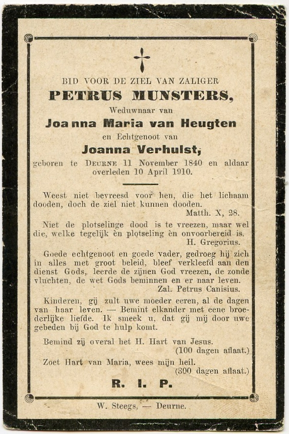 Gedachtenisprentje van Petrus (Pietje) Munsters (1840-1910), vermoord in de Wiemel. Naar aanleiding van deze moord schreef Antoon Coolen zijn roman "De Goede Moordenaar". coll hkk